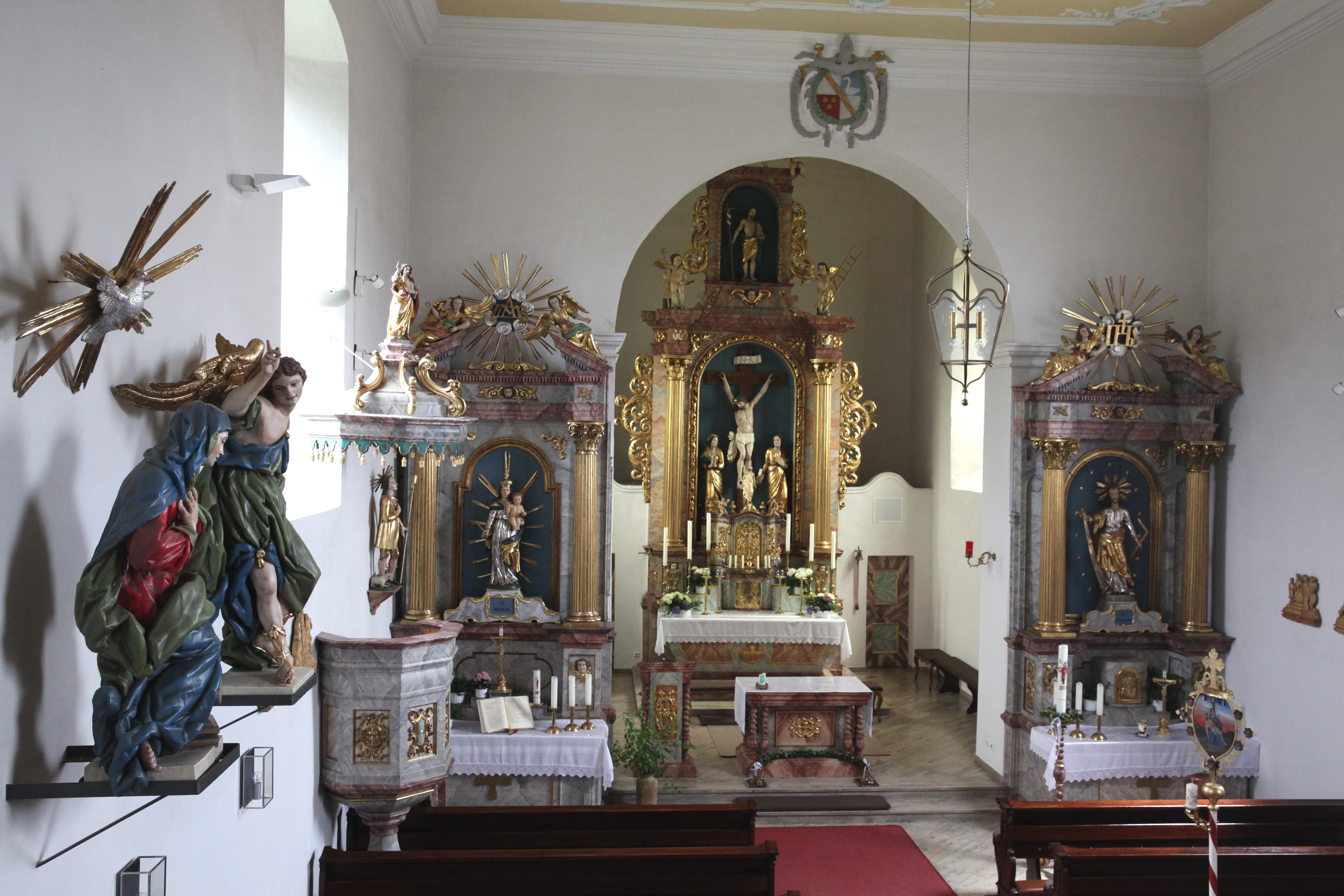 Altarraum, St. Johannes der Täufer, Witzmannsberg